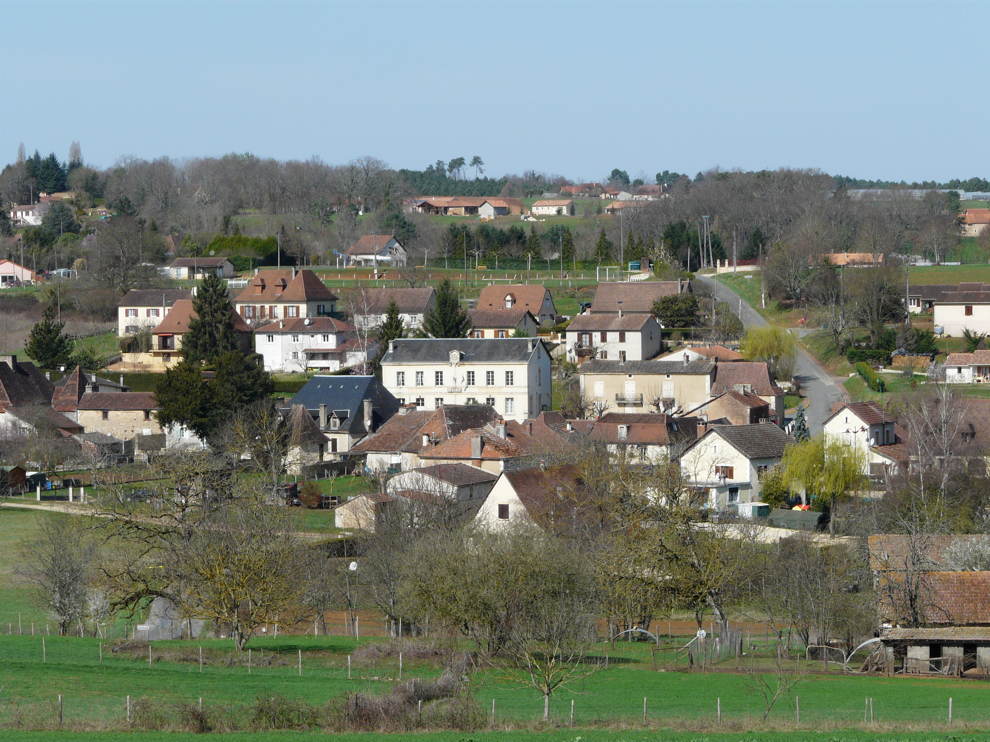 Le village de La Douze, Dordogne, France.